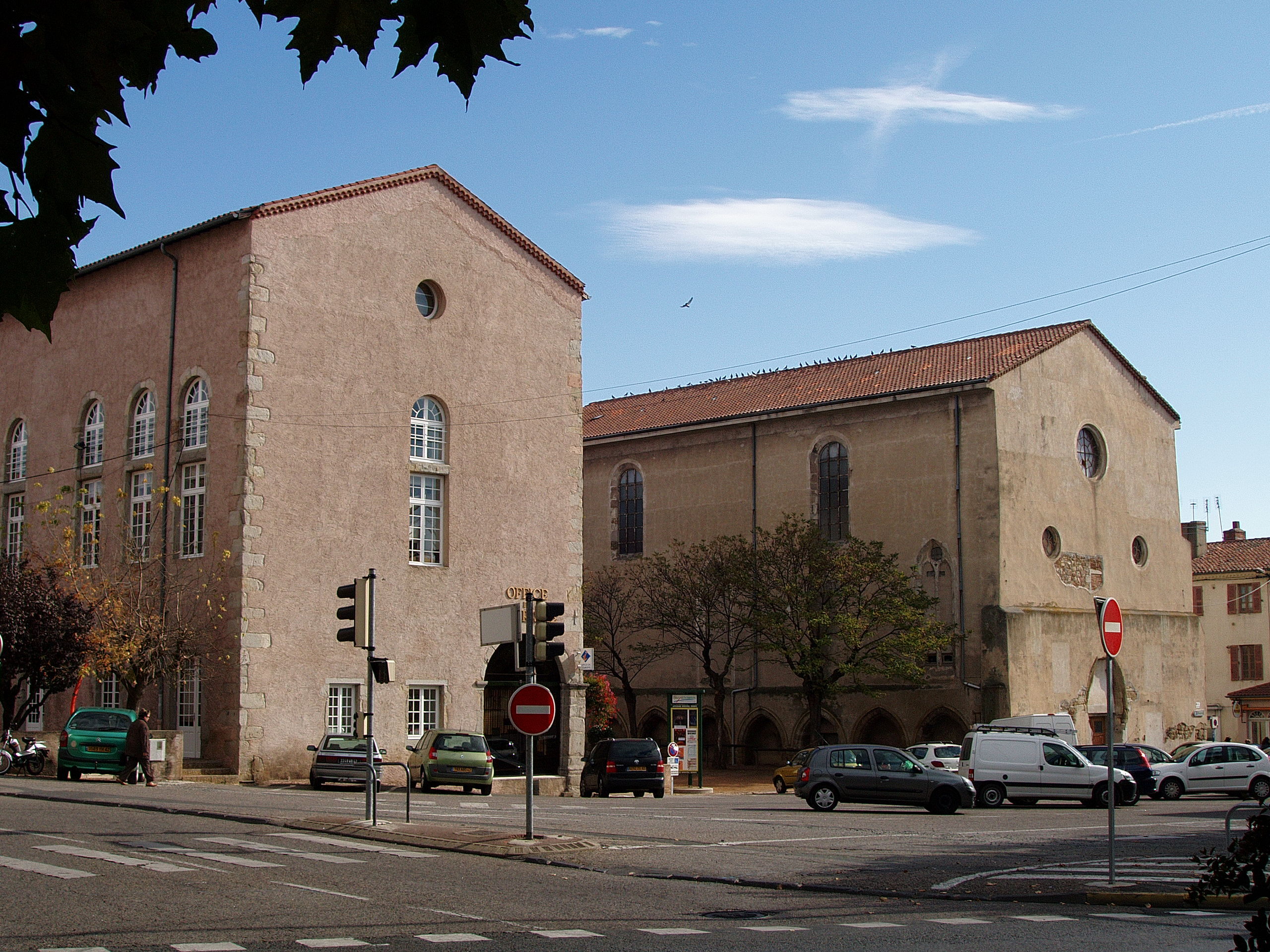 Montbrison